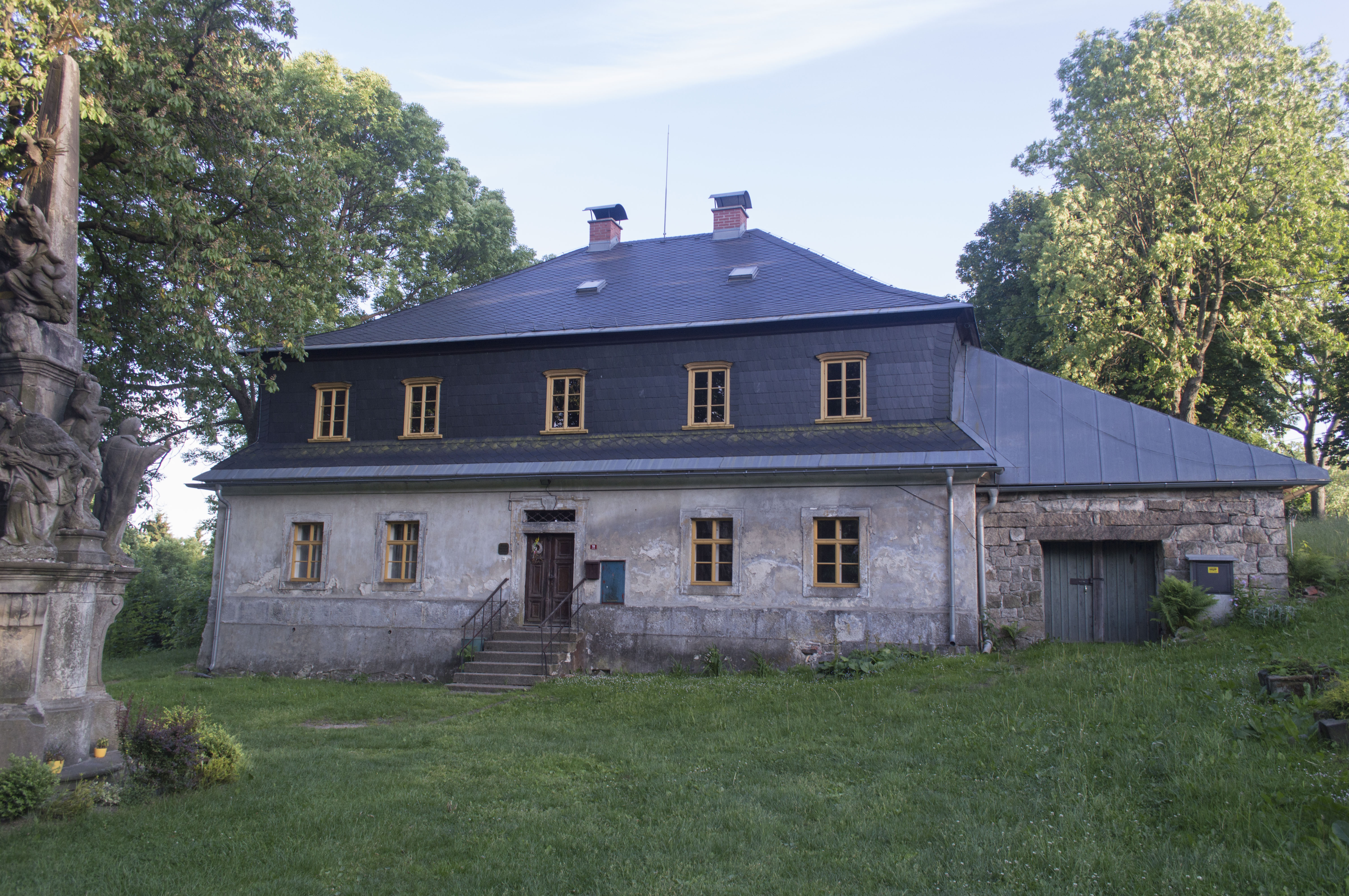 Krásná, součást obce Pěnčína. Farní budova.